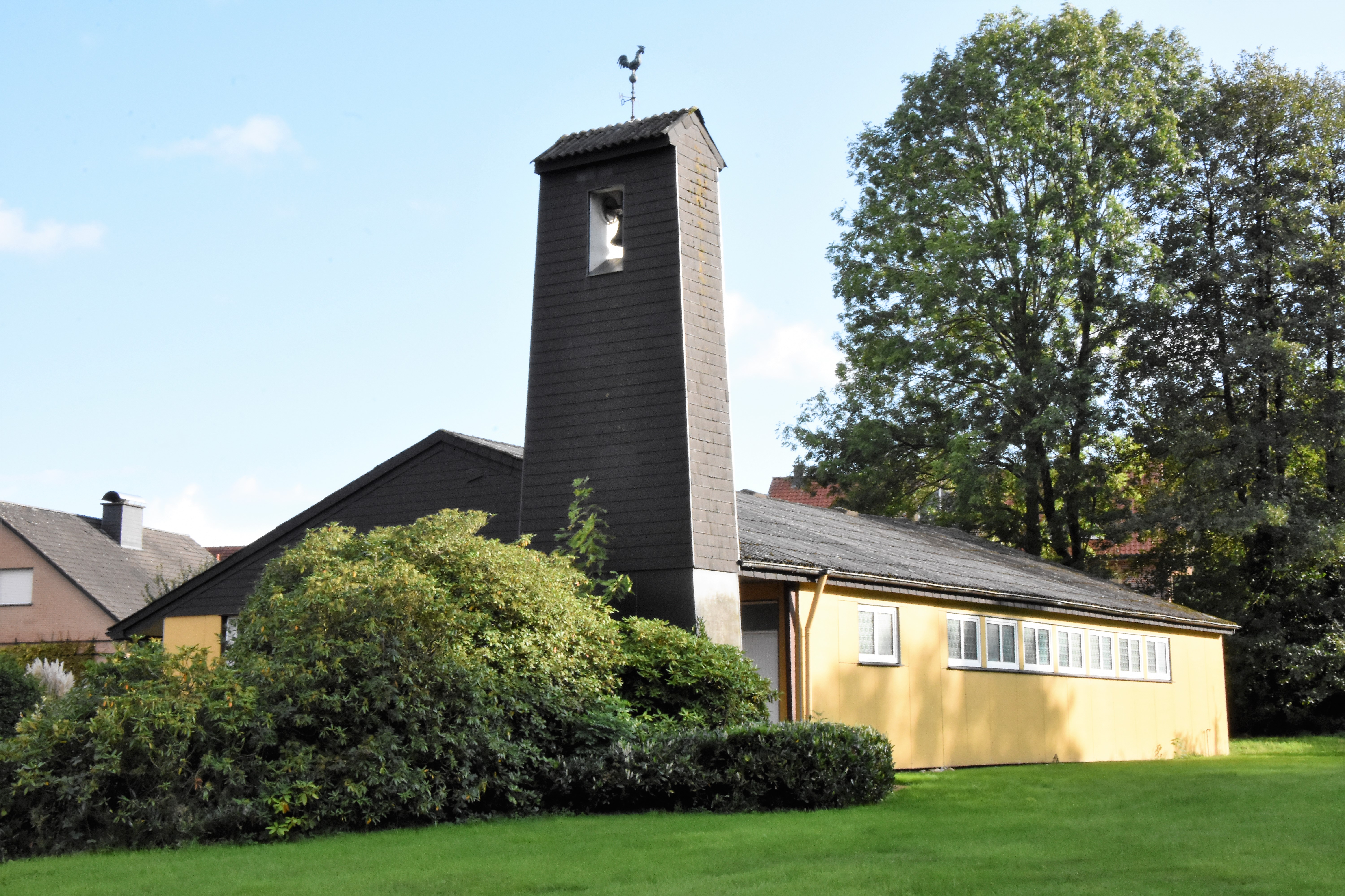 St. Hedwig in Tecklenburg-Leeden